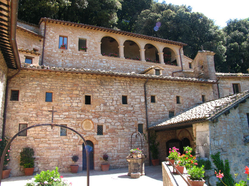 Assisi, Umbria, ItaliaEremo delle Carceri, Assisi 114